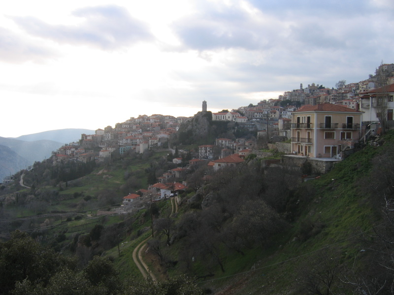 Blick auf Arachova (Griechenland), Februar 2009